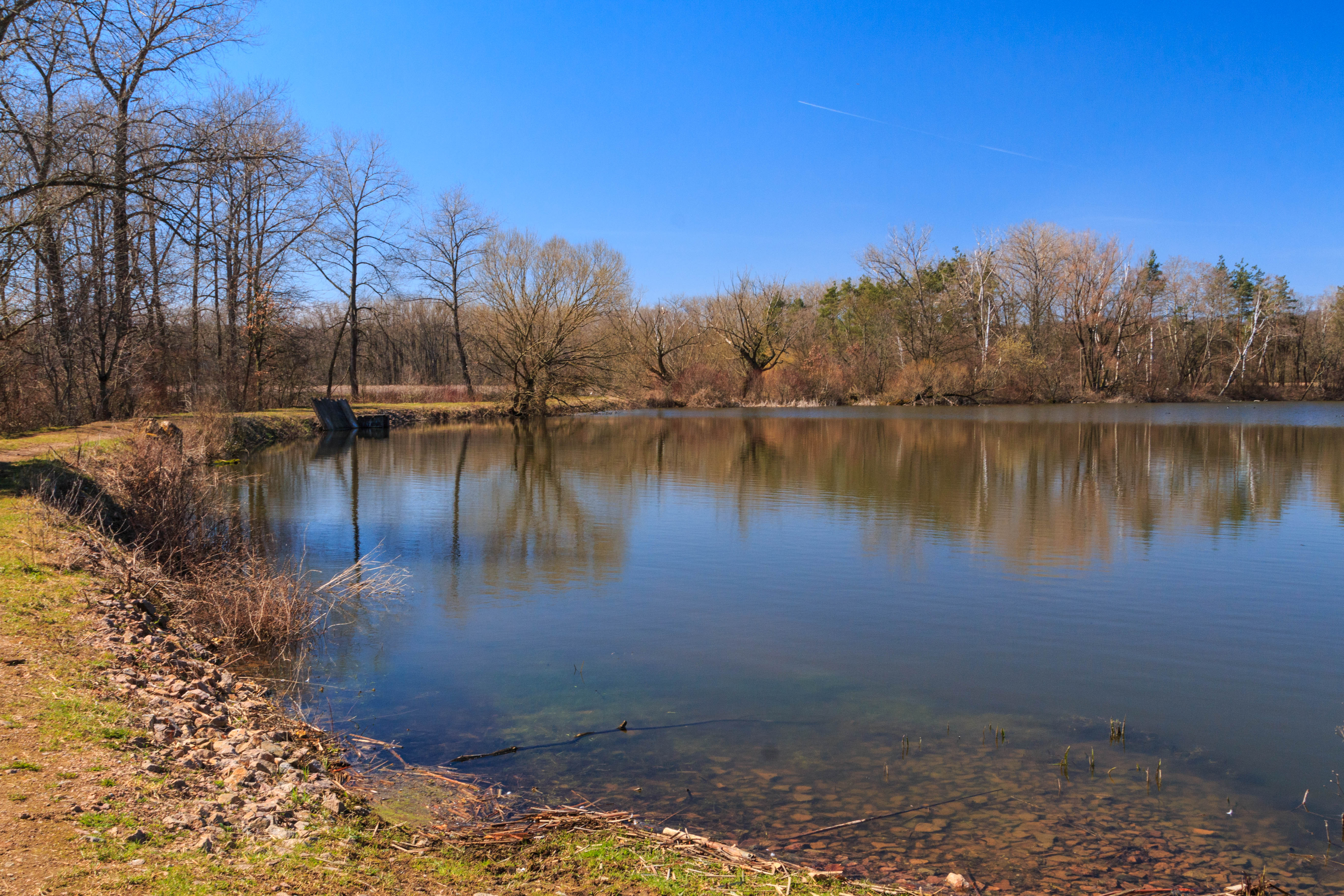 rybník Velký Lhoták u Starých Nechanic Project: Vodstvo.